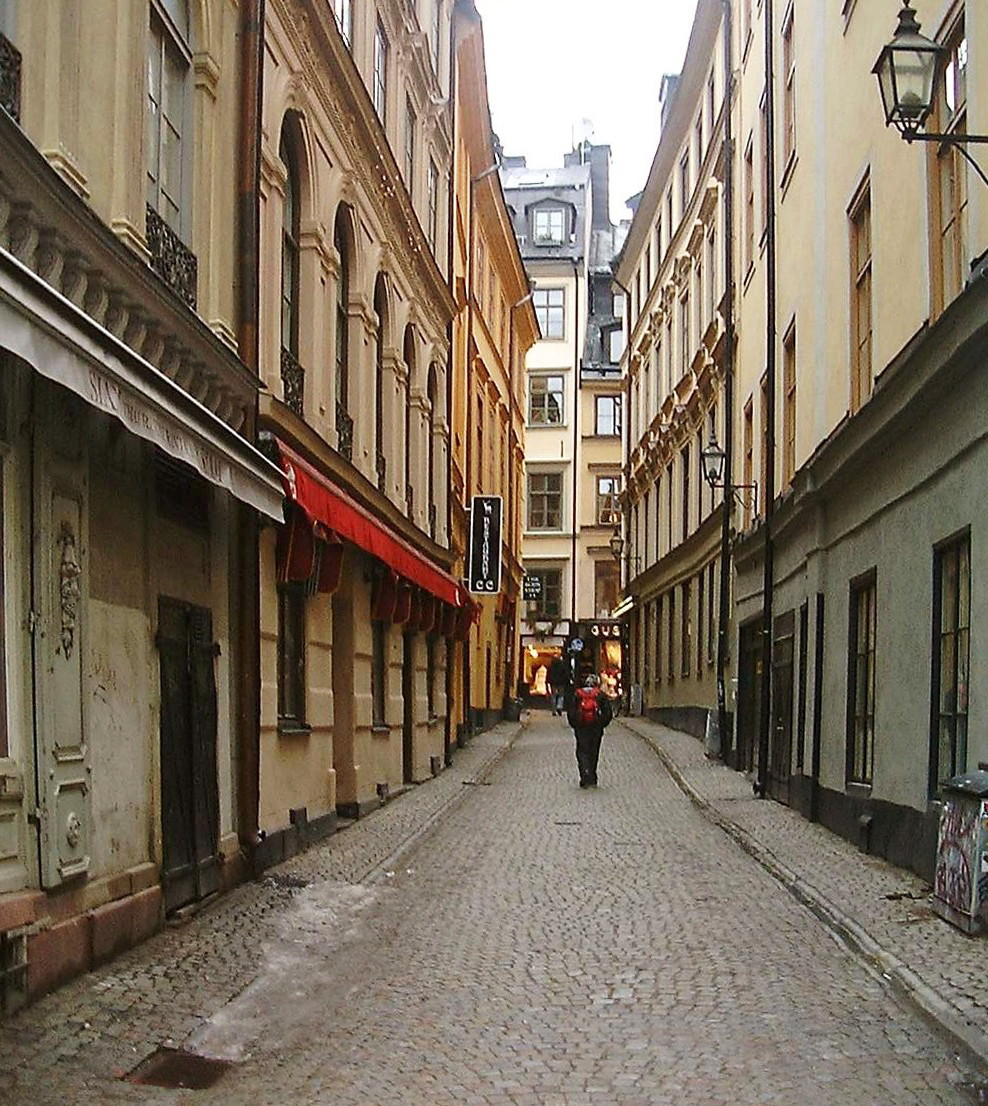 Skräddargränd, Gamla stan, Stockholm